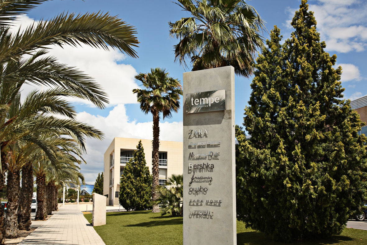 Instalaciones Tempe. Tempe es una empresa vinculada al Grupo Inditex. Su papel es el de diseñar todas las colecciones de calzado, controlar su producción y llevar a cabo la distribución.